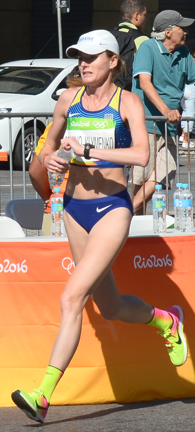 Passage du marathon des jeux olympiques de Rio 2016 dans le centre de Rio